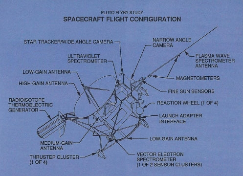 A diagram of Pluto 350.